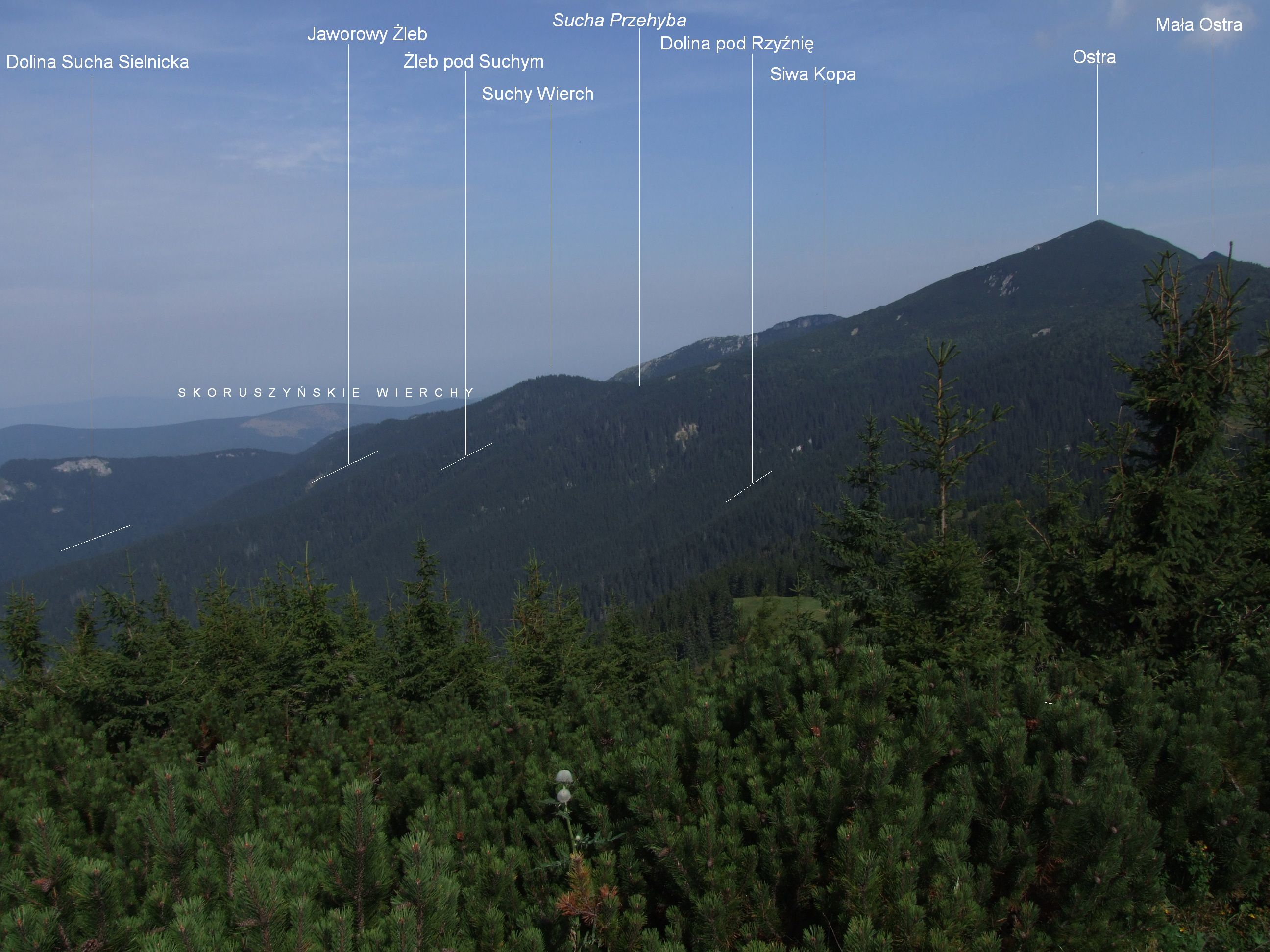 Widok z Babek na Dolinę Suchą Sielnicką